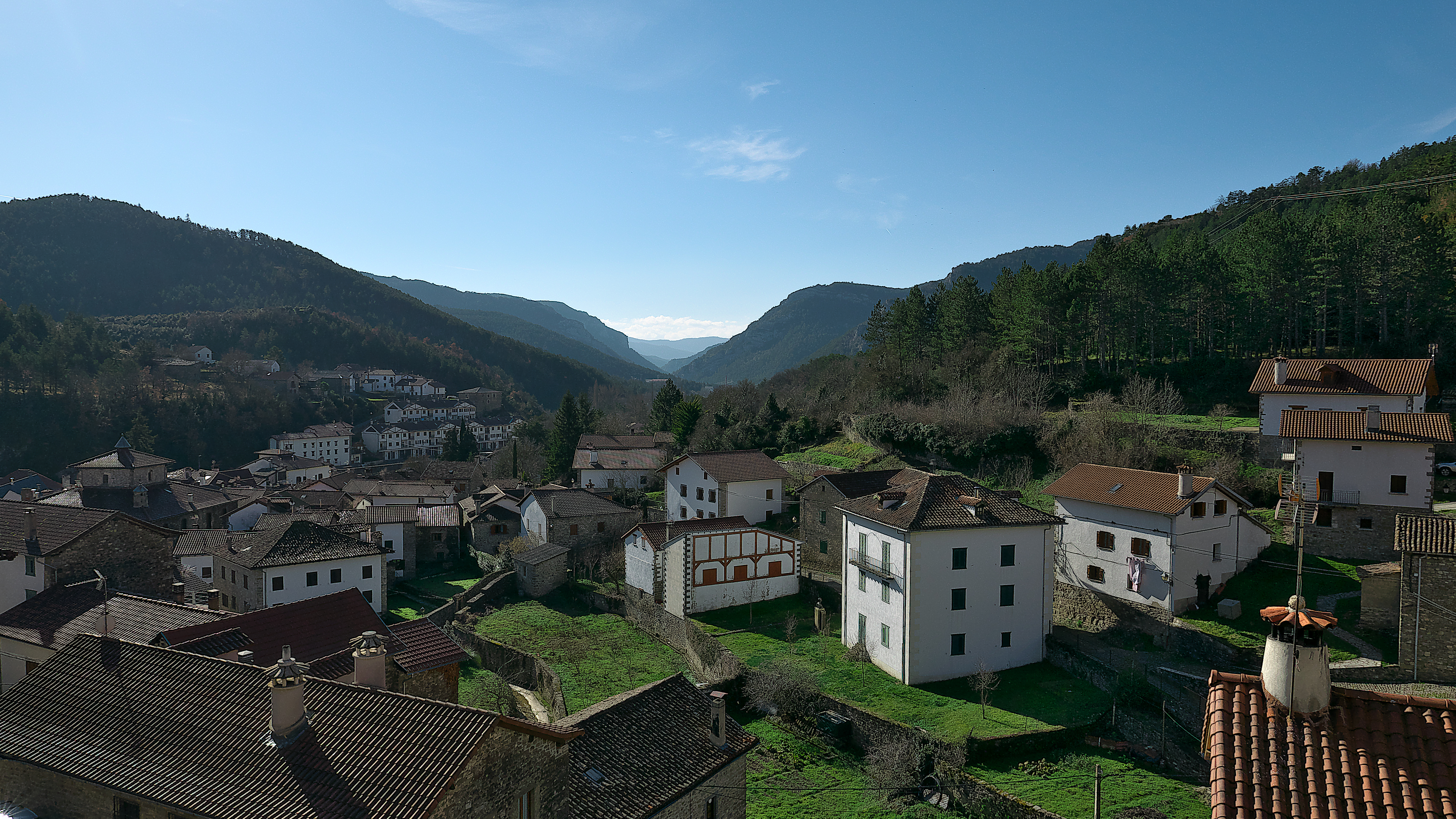 Vista del valle de Roncal.